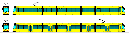 Beschreibung: Ansicht NGTD12DD Erstellt: Marco Präg Lizenzstatus: GNU FDL